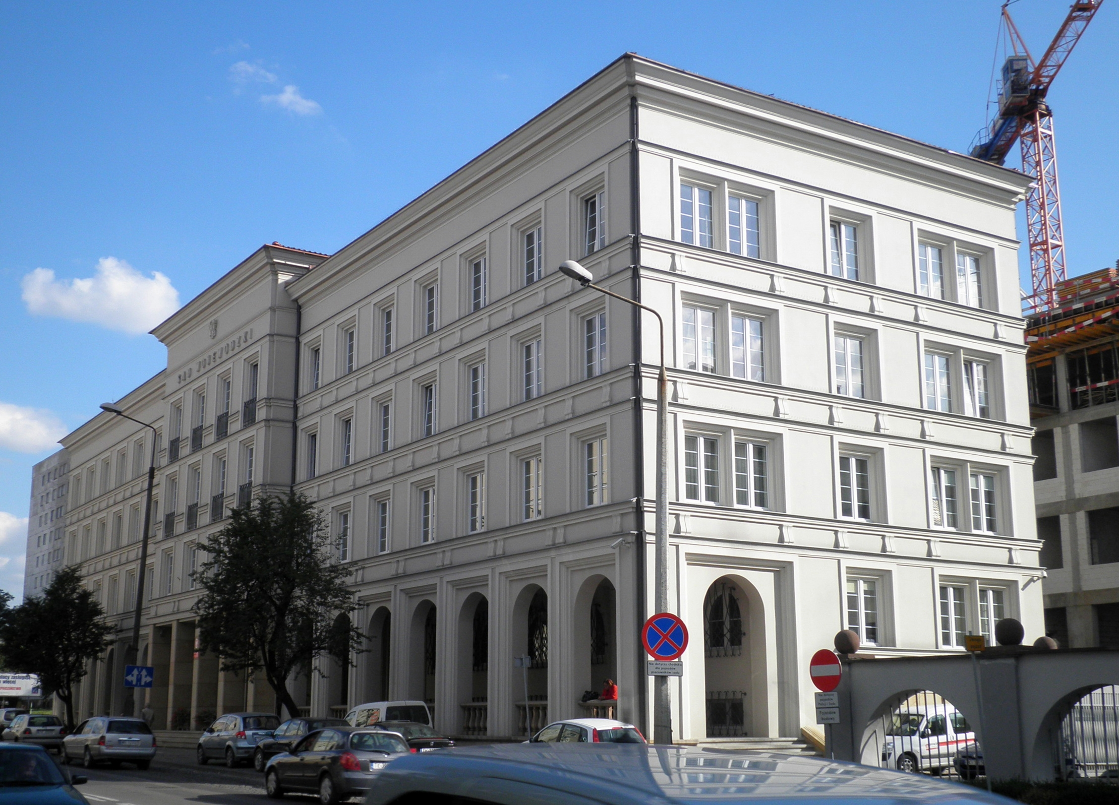 Sąd Wojewódzki przy ul. Seminaryjskiej 12a w Kielcach